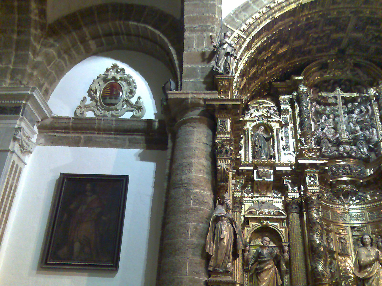 Escudo de Guipúzcoa en la Iglesia de la Santa Cruz (Catedral vieja) de Cádiz. Probablemente proviene de la desaparecida capilla de los vizcaínos.